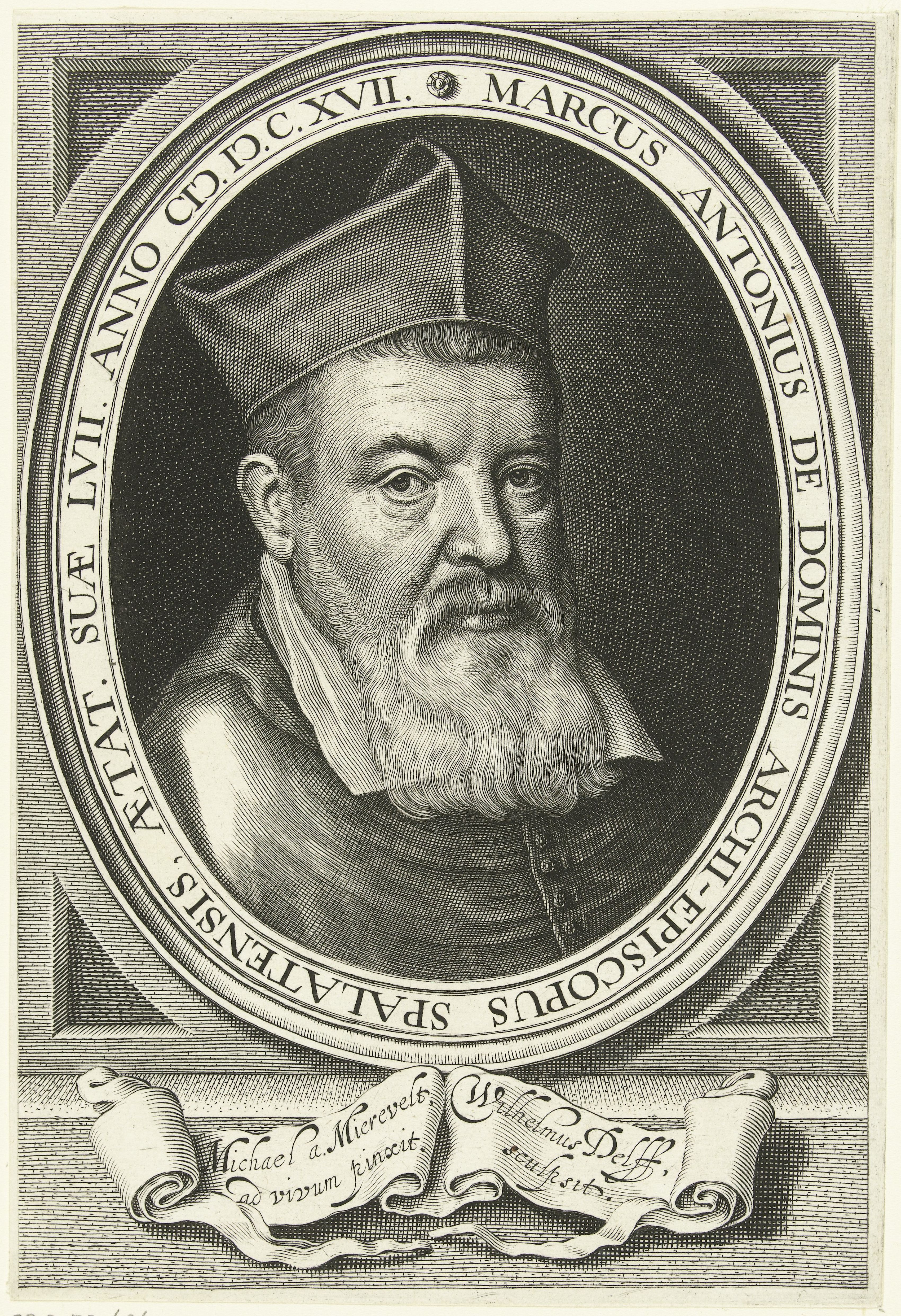 IdentificatieTitel(s): Portret van aartsbisschop Marcus Antonius de Dominis op 57-jarige leeftijdObjecttype: prent Objectnummer: RP-P-BI-6863Catalogusreferentie: Hollstein Dutch 24-1(2)Opschriften / Merken: verzamelaarsmerk, verso, gestempeld: Lugt 2228Omschrijving: Portret van aartsbisschop Marcus Antonius de Dominis op 57-jarige leeftijd, borststuk gekleed in ambtsgewaad in ovale omlijsting met latijns opschrift.VervaardigingVervaardiger: prentmaker: Willem Jacobsz. Delff (vermeld op object)naar schilderij van: Michiel Jansz. van Mierevelt (vermeld op object)Plaats vervaardiging: DelftDatering: 1617Fysieke kenmerken: gravureMateriaal: papier Techniek: graveren (drukprocedé)Afmetingen: blad: h 181 mm × b 127 mmOnderwerpWat: archbishop, bishop, etc. (Roman Catholic)Wie: Marcus Antonius De DominisVerwerving en rechtenVerwerving: onbekendCopyright: Publiek domein